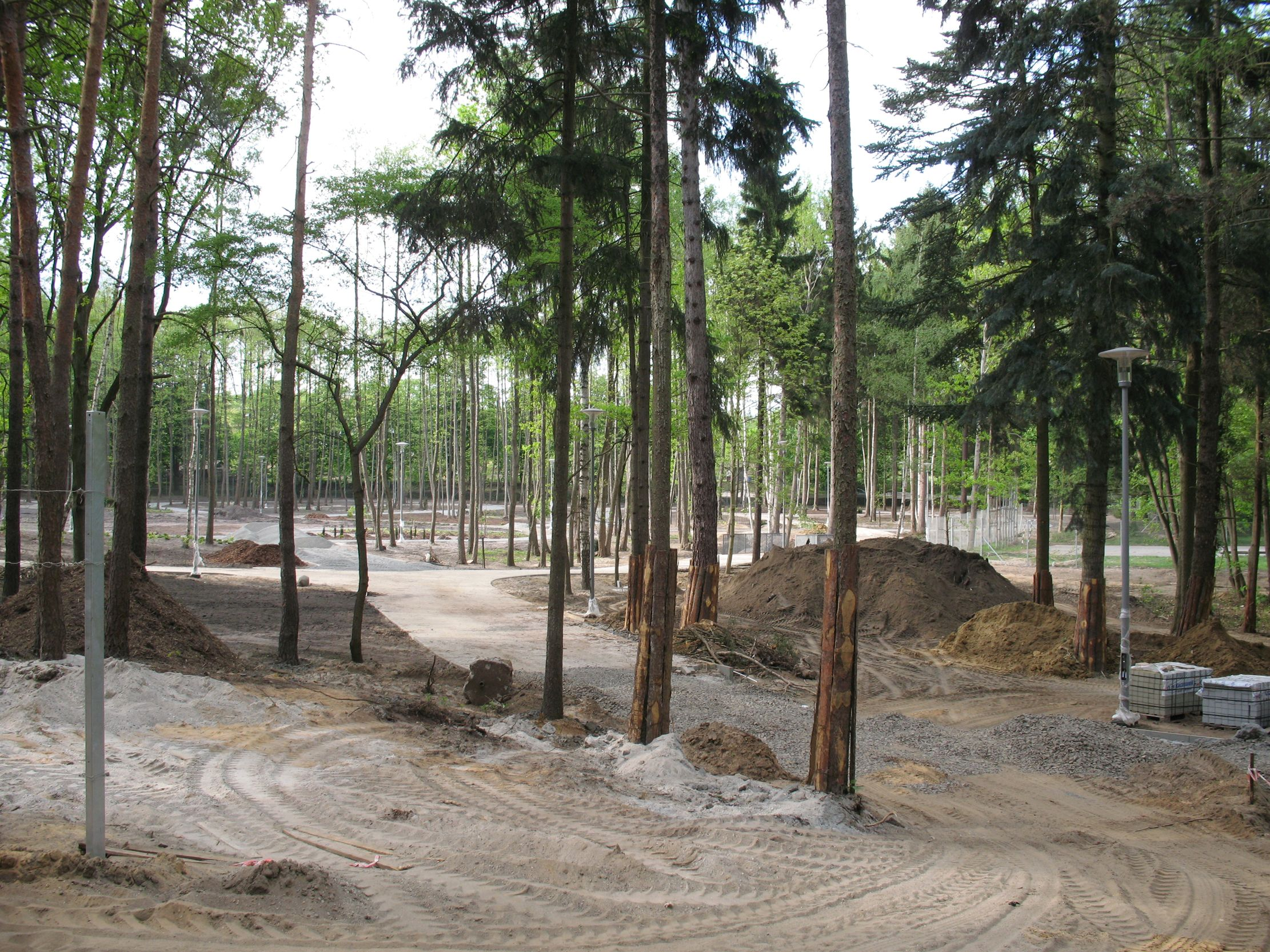 Ogród Botaniczny w Zielonej Górze w fazie budowy (kwiecien 2007)